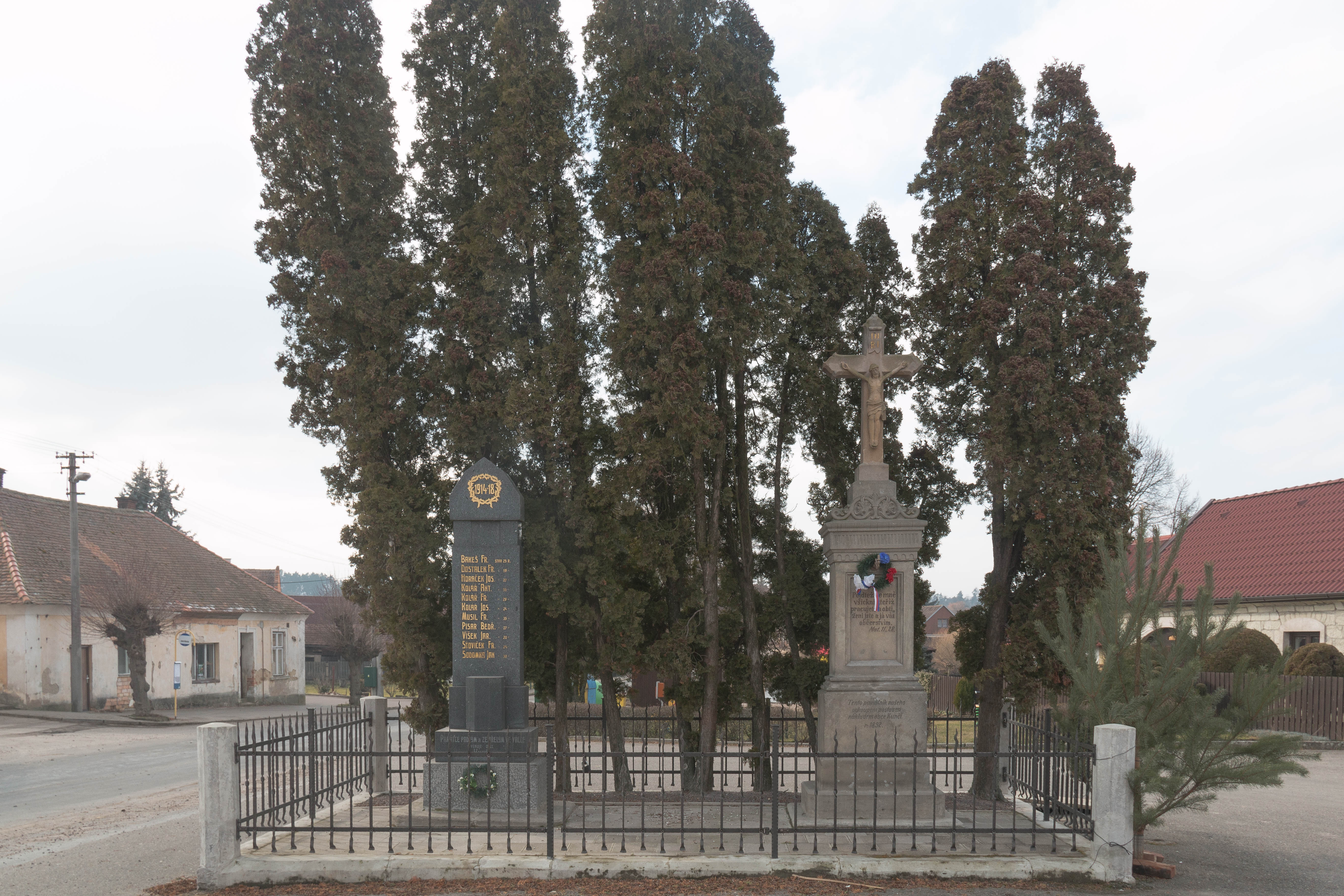 Kunčí u Slatiňan